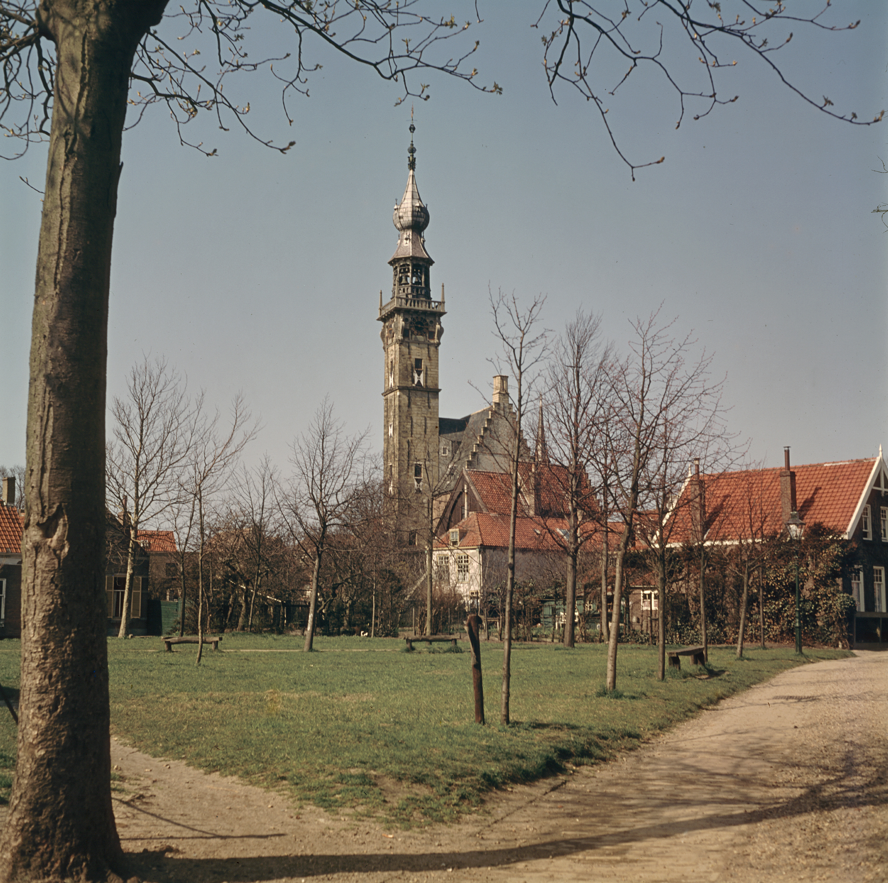 Stadhuis: Overzicht met omgeving